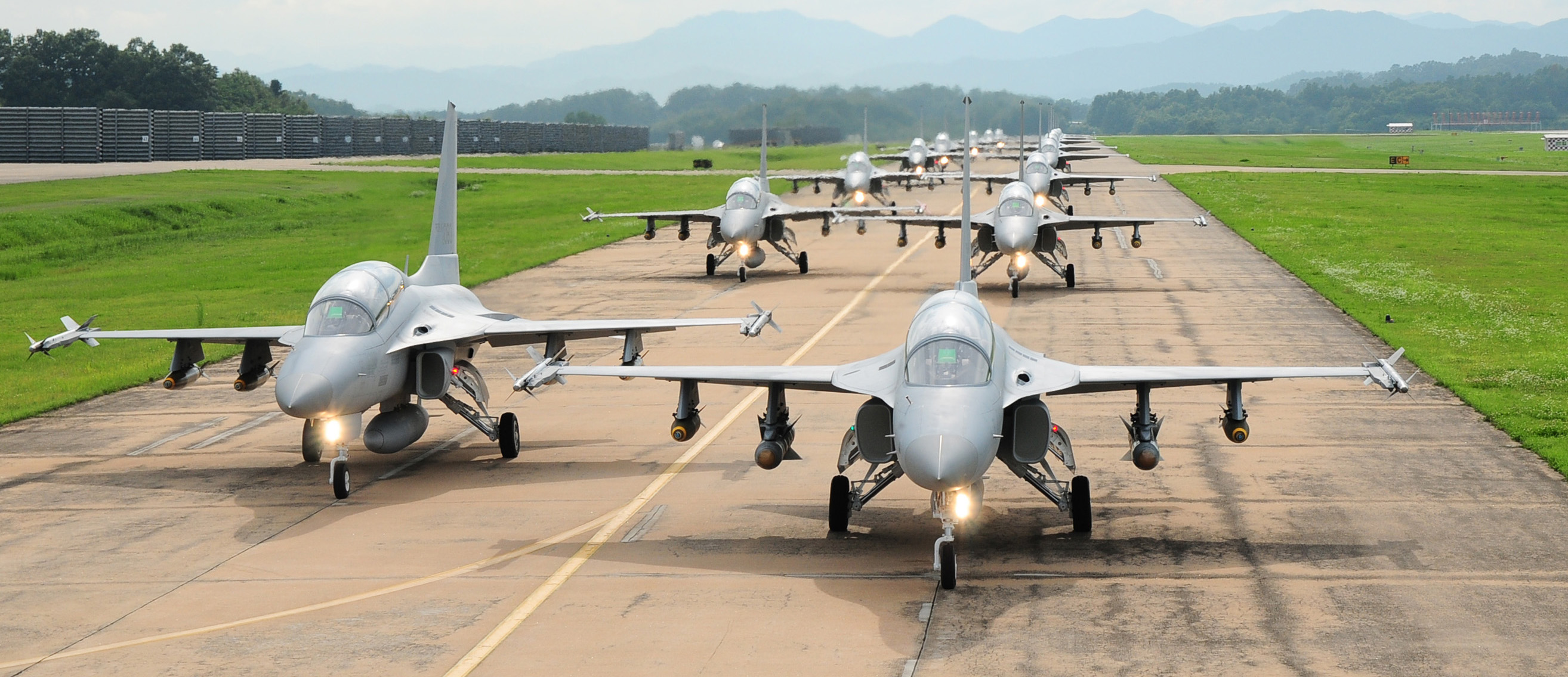 TA-50 그룹 디스플레이